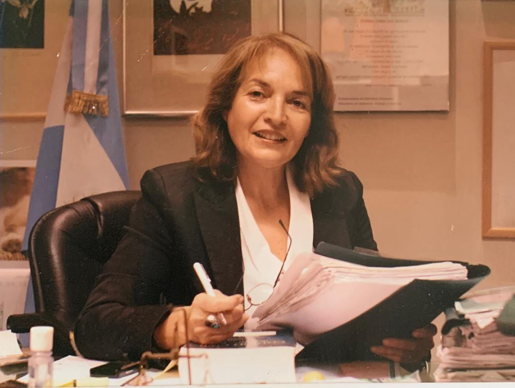 Fotografia de la Jueza Elena Liberatori en el Juzgado N° 4 en lo Contencioso Administrativo y Tributario de la ciudad de Buenos Aires